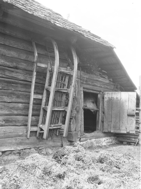 Regi räästa all, hobusetall, samblad kuivamas, Rõuge khk